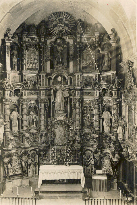 Fotografia trobada als anys 50 a la masia Mastell de Llofriu corresponent al retaule que va el·labora Pau Costa cap el 1760. Existeixen 3 cópies models i una de elles està a l'arxiu municipal de Palafrugell metre que l'original encara es conserva al Mastell. El retaule va ser cremat l'any 1936 durant la guerra civil española.